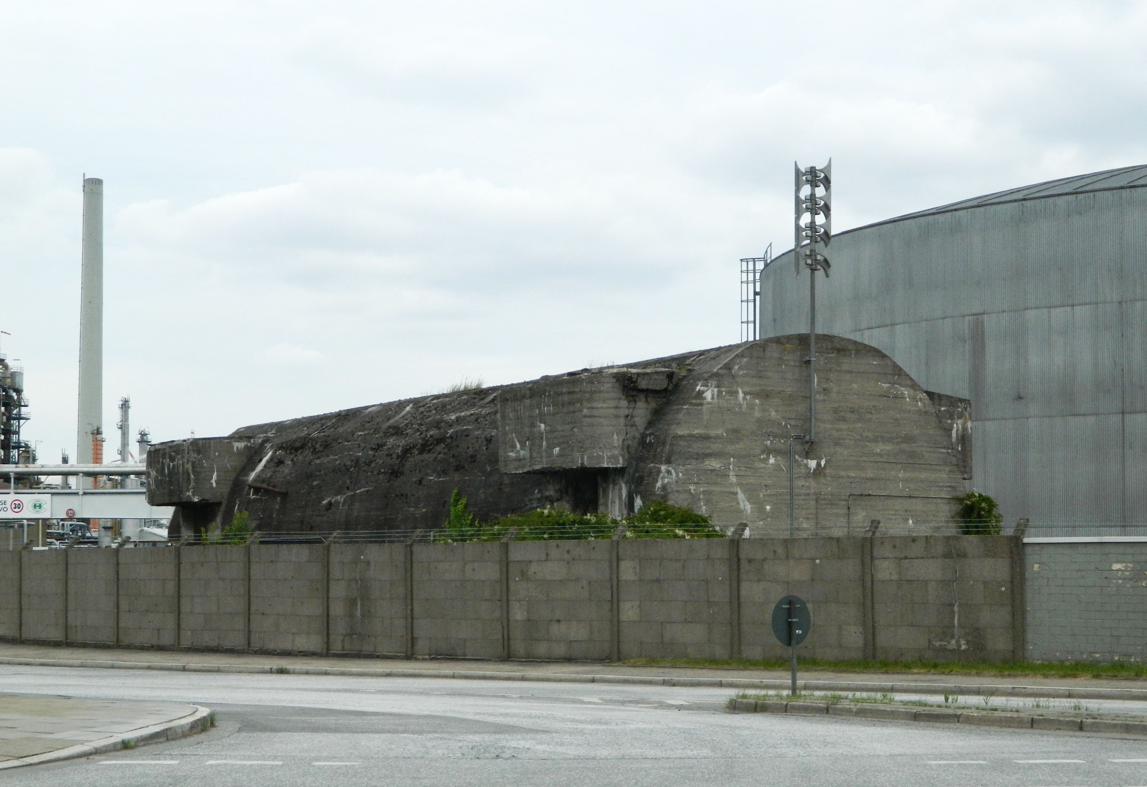 Werkschutz-Mannschaftsbunker vom Typ „Salzgitter“ im Harburger Seehafen, vermutlich erbaut 1944 im Rahmen des „Geilenberg-Programms“, siehe Mineralölsicherungsprogramm (vgl. Schmal, Selke: Bunker. Luftschutz und Luftschutzbau in Hamburg, Hamburg 2001, S. 54.)